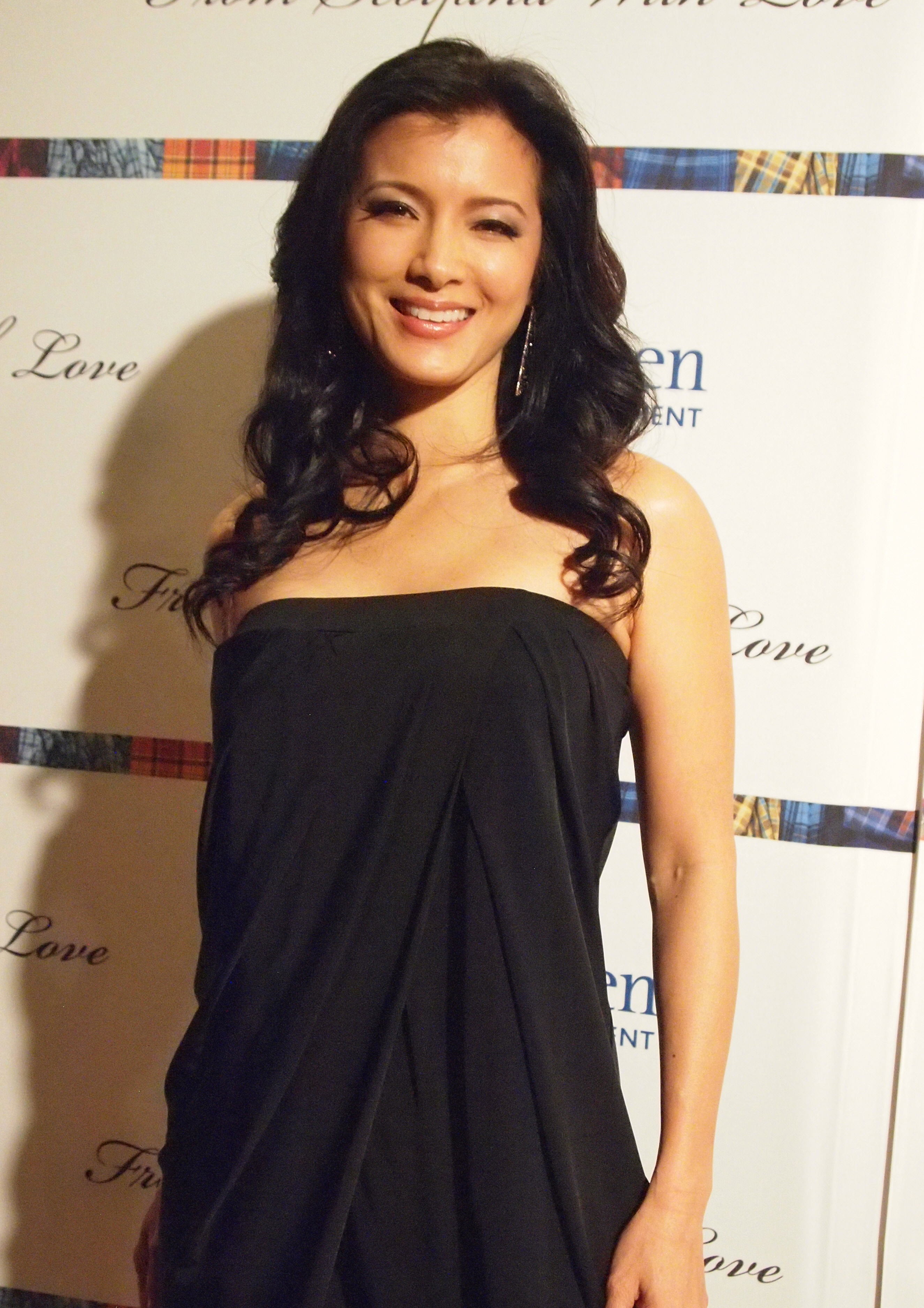 KellyHu_040813_05